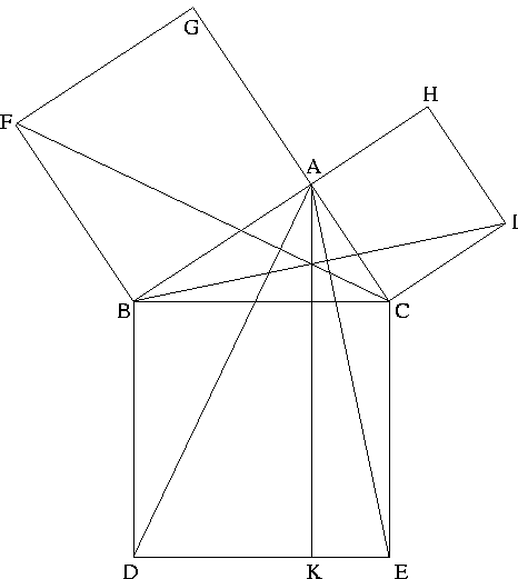 Diagramme utilisée dans la démonstration du théorème de Pythagore donné par Euclide.